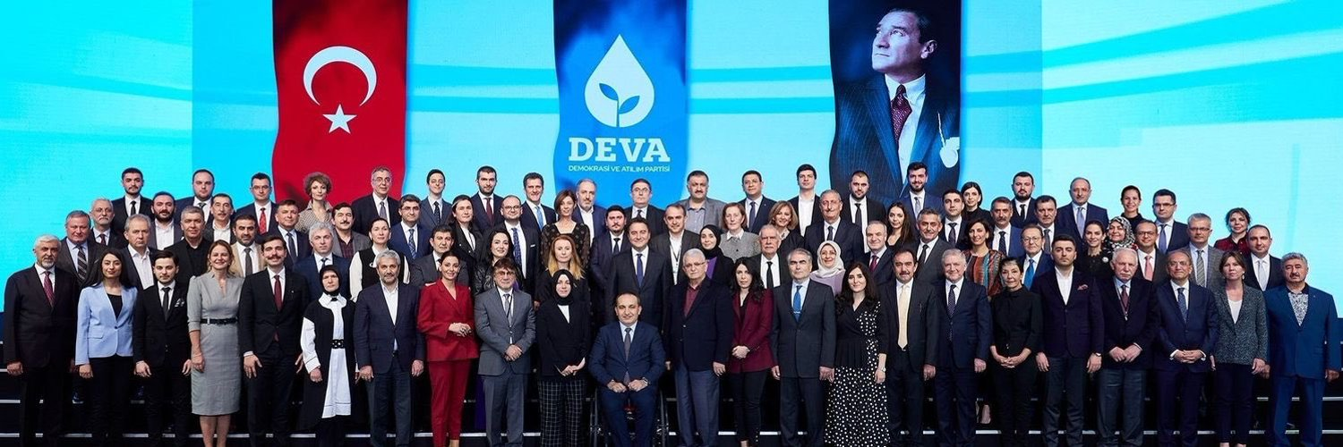 DEVA Partisi Kurucuları